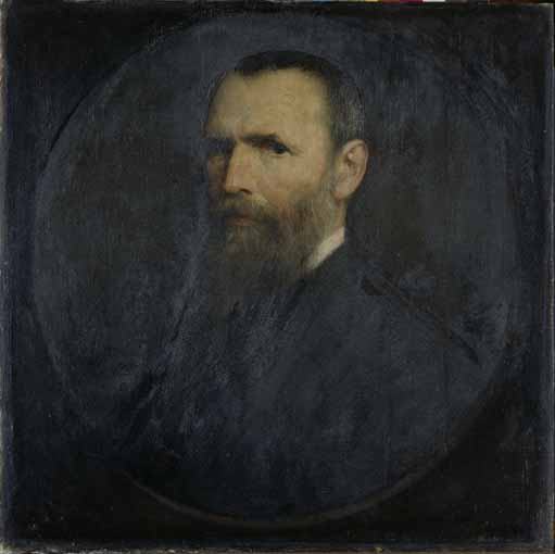 Self-portrait